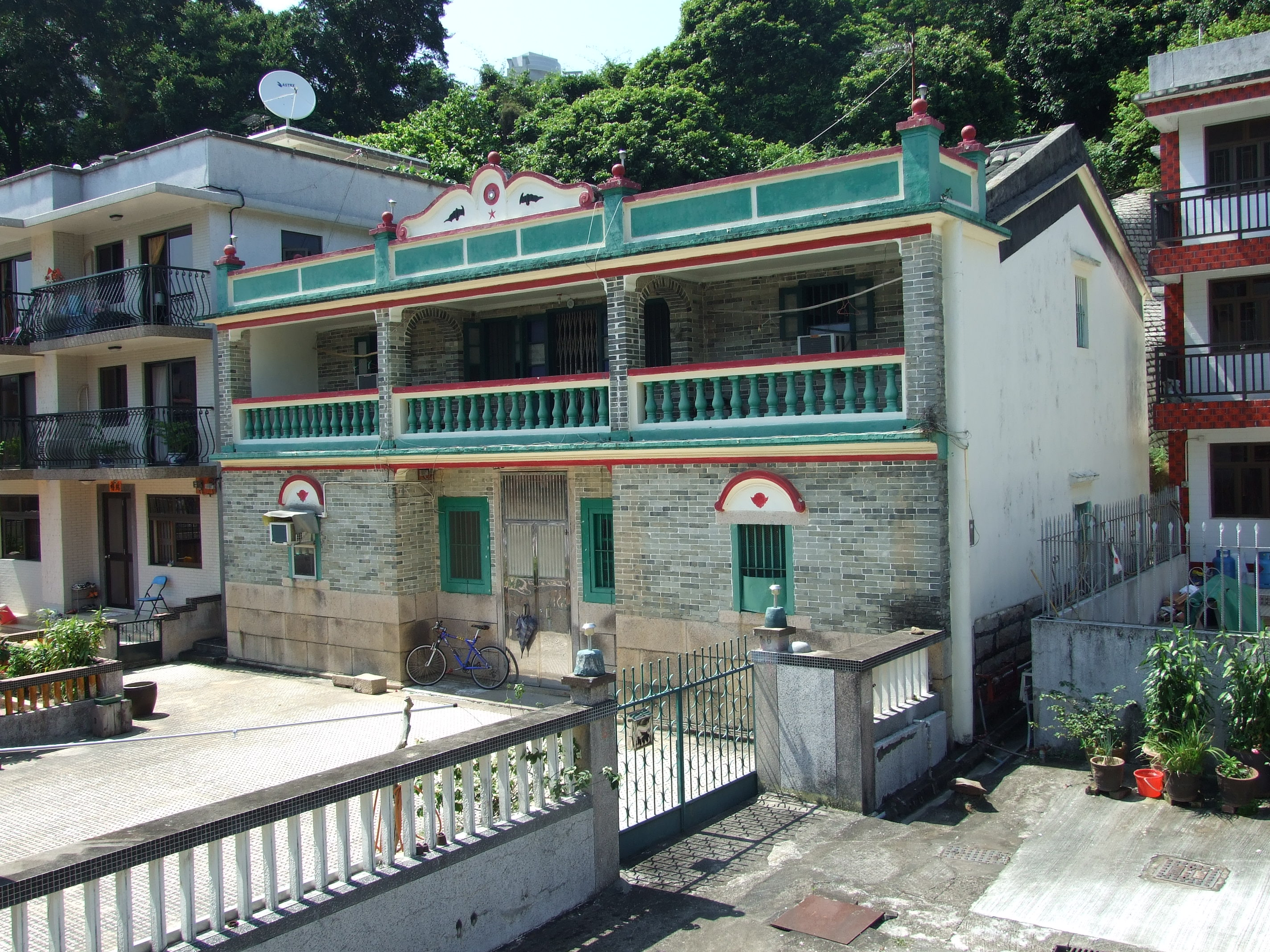 中文（香港）: 大水坑張氏村屋 Cheung Village House, No. 6 Tai Shui Hang, Sha Tin, N.T. 1025